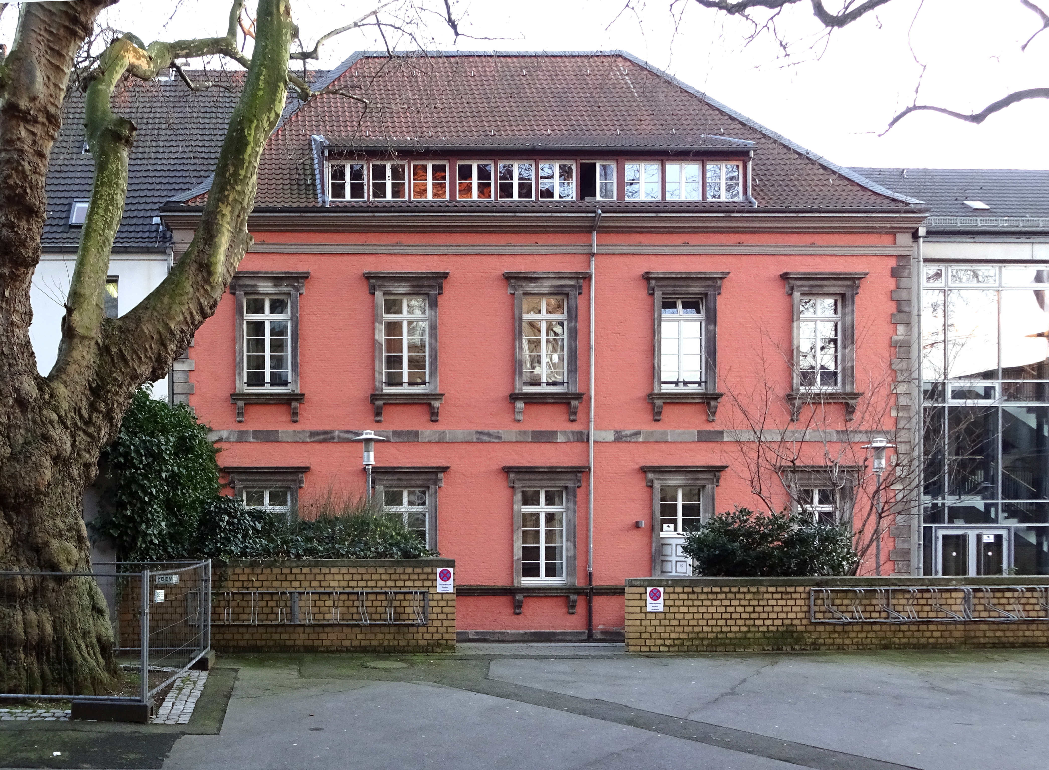 Ritterstraße Schulhof St.-Ursula-Gymnasium, Rückseite Palais Schaesberg